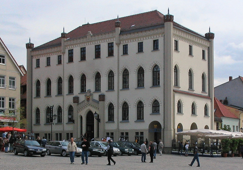 Beschreibung: Waren (Müritz) - Neue Rathaus Fotograf: Darkone, 14. Mai 2005